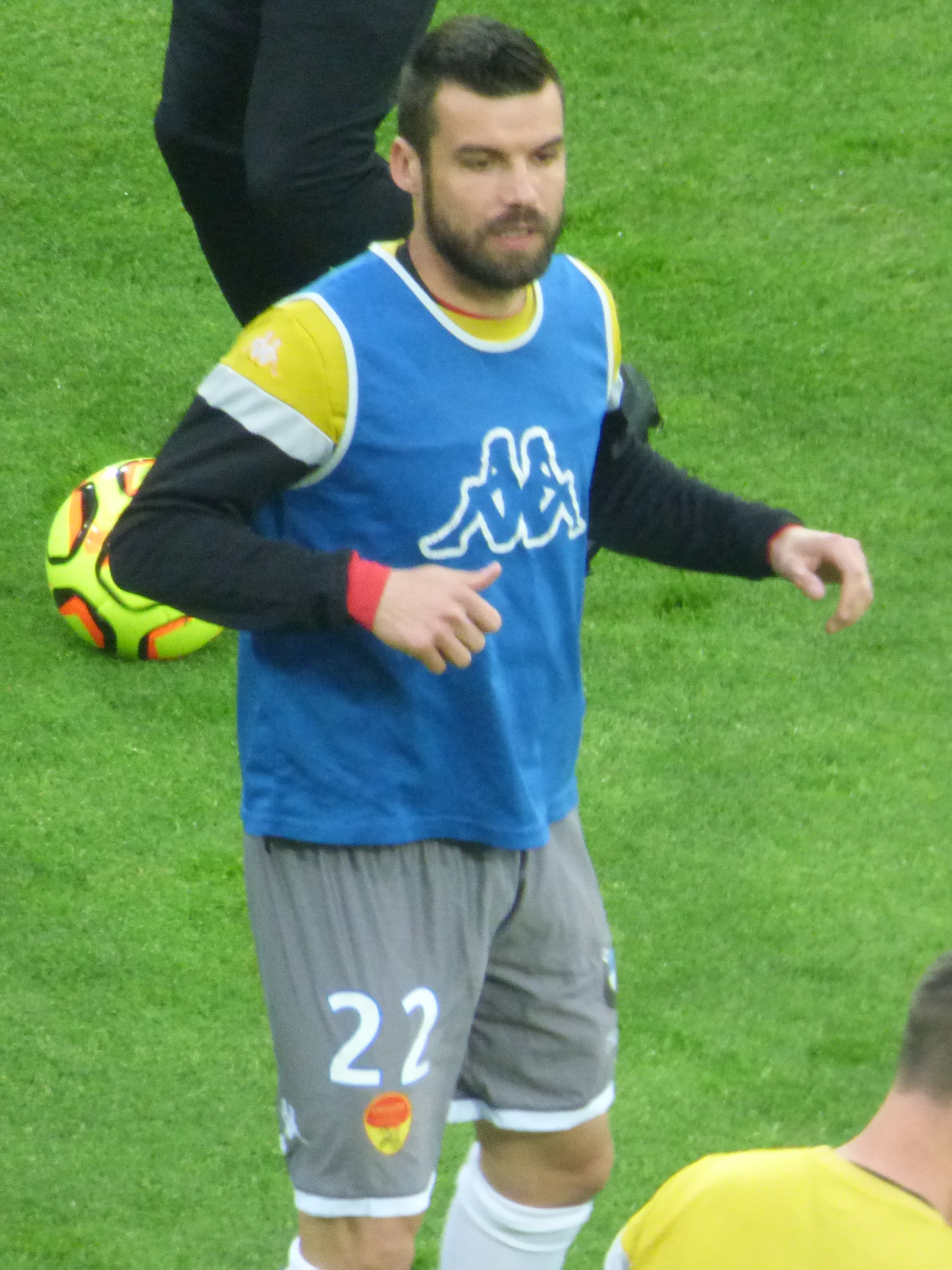 Gauthier Pinaud avant le match RC Lens / US Orléans, le 17 mai 2019, comptant pour la 38ème journée du championnat de France de football de Ligue 2 2018-2019, au Stade Bollaert-Delelis.